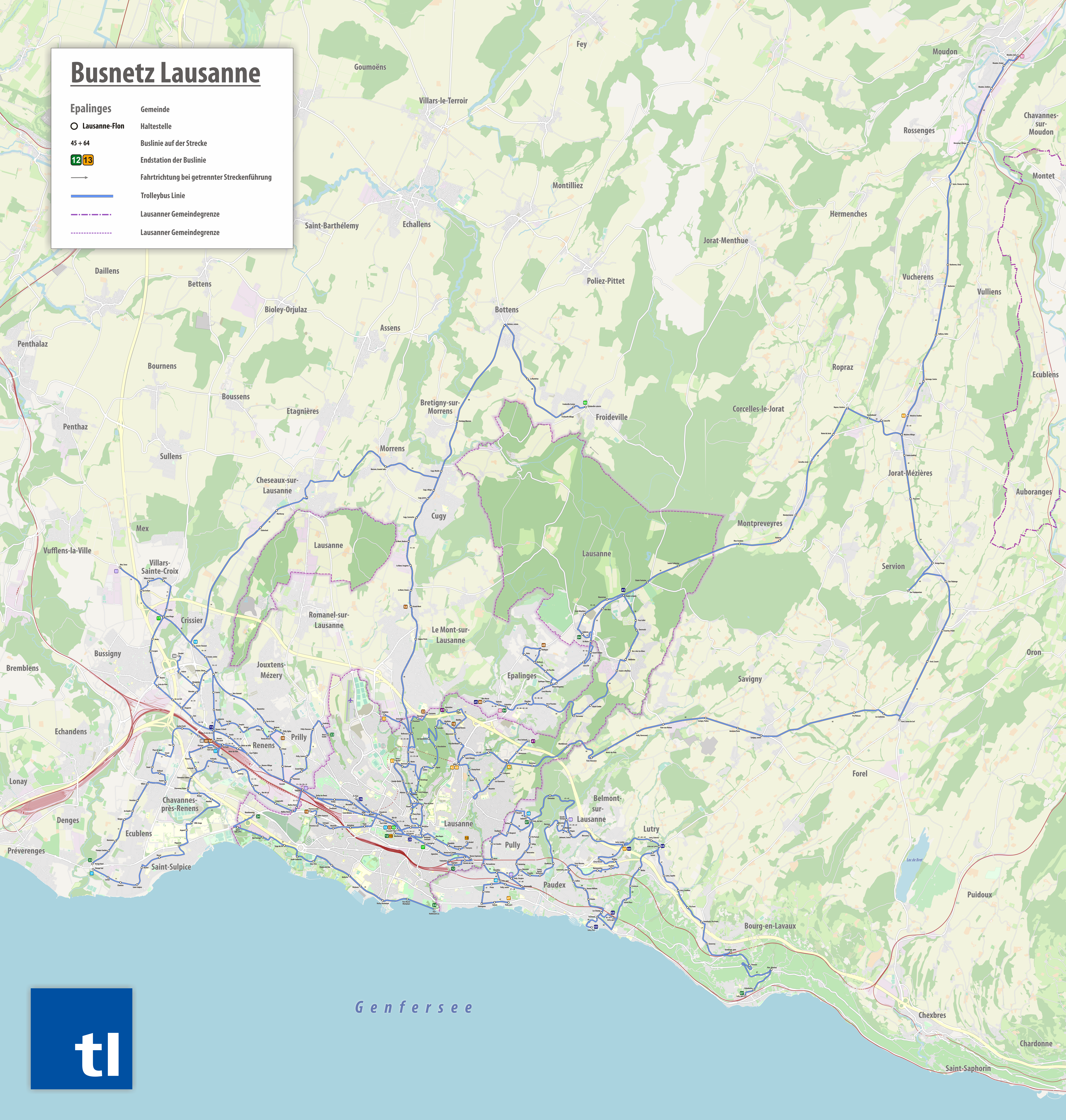 Busnetzplan des Transports publics de la région lausannoise (TL), ab 15. Dezember 2019